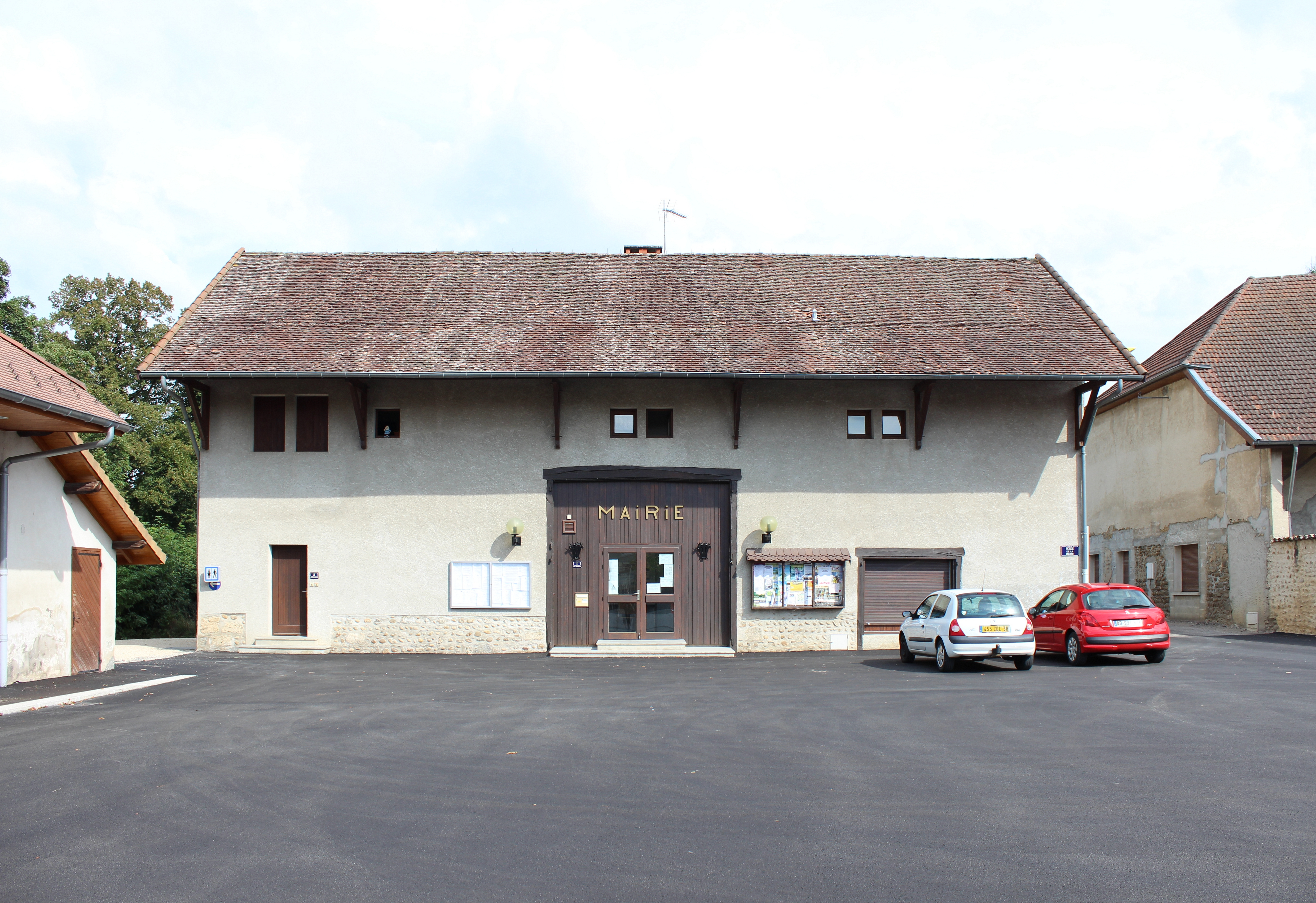 La mairie de Burcin.